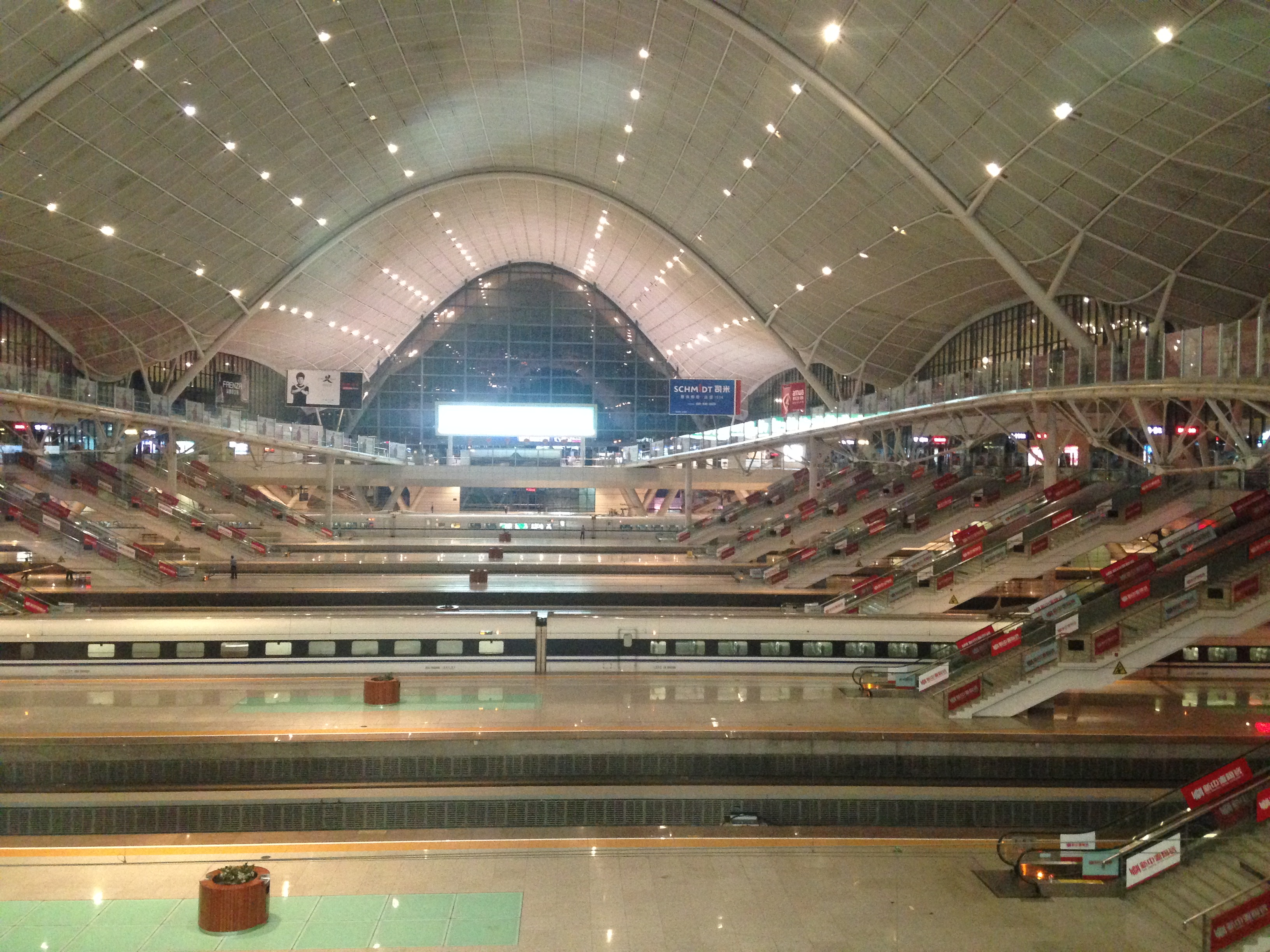 武漢駅の夜景